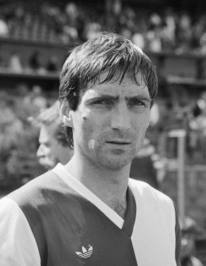 Feyenoord tegen Den Haag. De Bulgaar Jeliaskov van Feyenoord